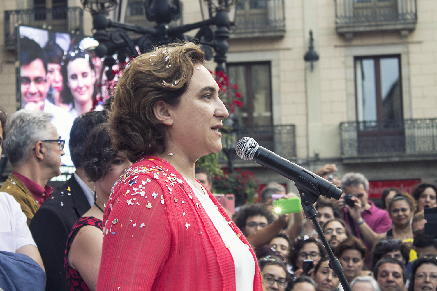 Plaça Sant Jaume 13/06/2015 Foto: Marc Lozano Investiture of Ada Colau, 14 June 2015, Barcelona